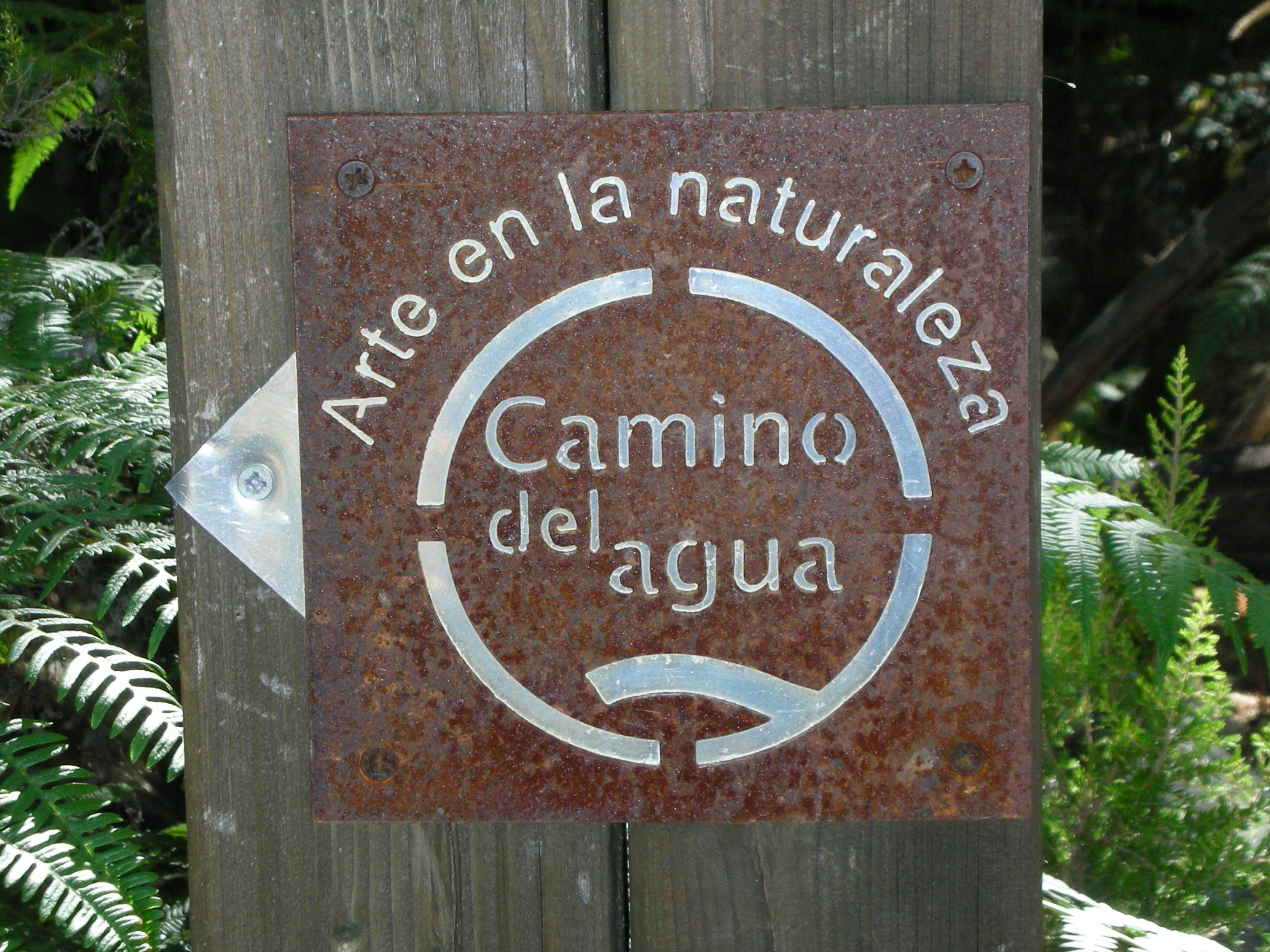 Balisage de sentiers autour de la commune de Sotoserrano